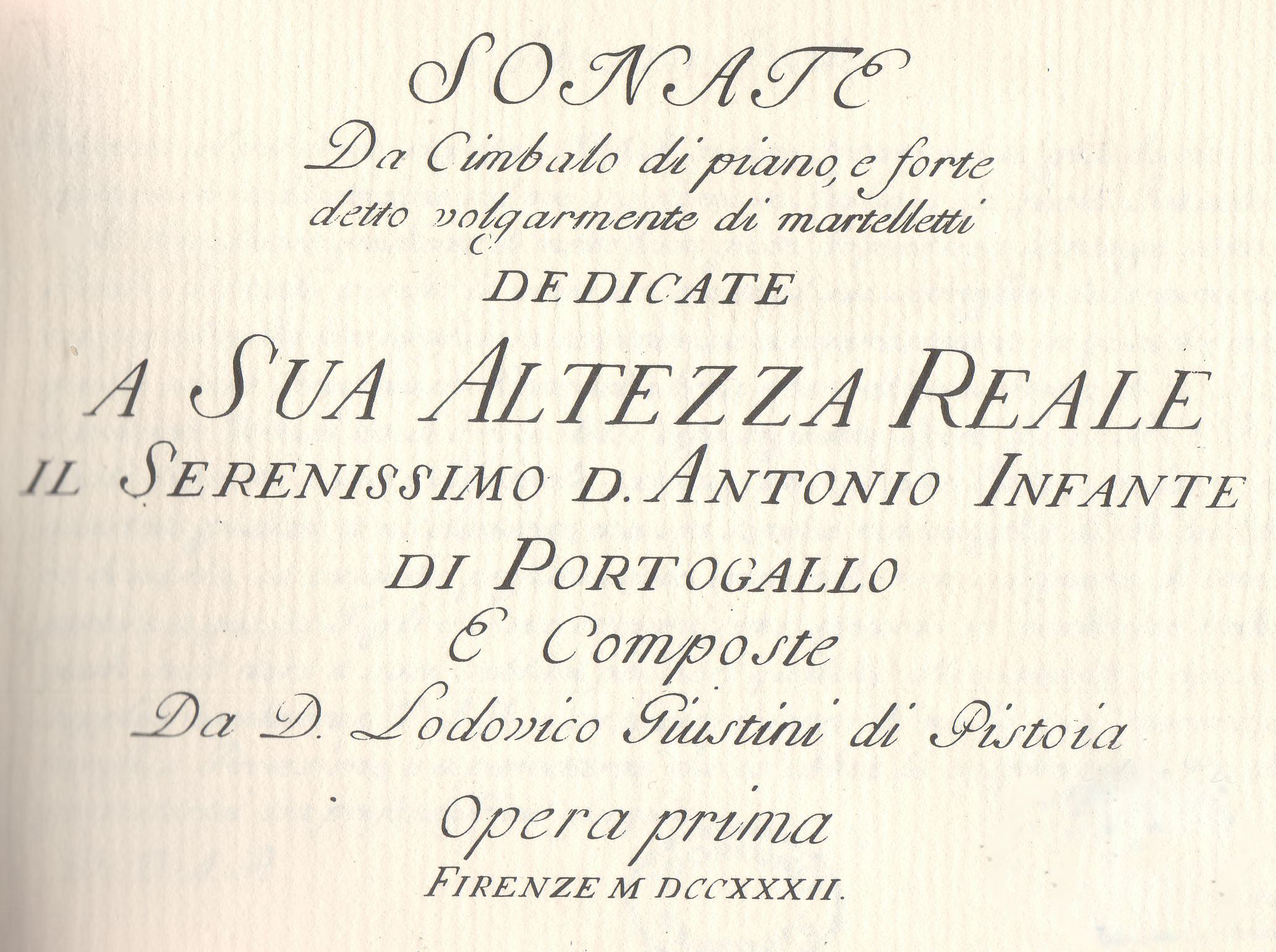 Frontespizio di un autografo prodotto nel 1732. Frontespizio dell'autografo delle 12 sonate de cimbalo di piano e forte detto volgarmente di martelletti Lodovico Giustini (1685-1743).